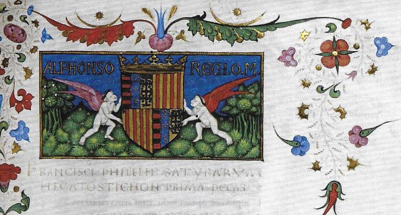 Escudo de armas de Alfonso V de Aragón en la primera página de Satyrarum hecatostichon de Francesco Filelfo. Figura, con la inscripción Alphonso regi optimo. Colección Duque de Calabria. Universidad de Valencia. Biblioteca Histórica. BH Ms. 398.